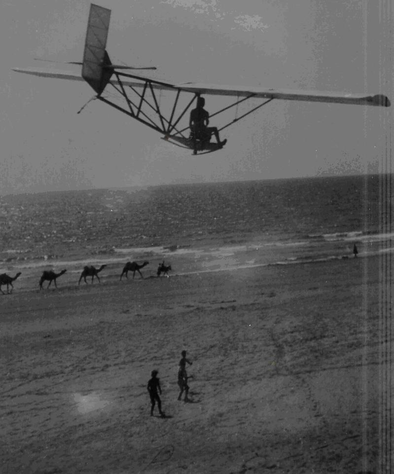 בנימין כהנא דואה מעל חוף בת ים